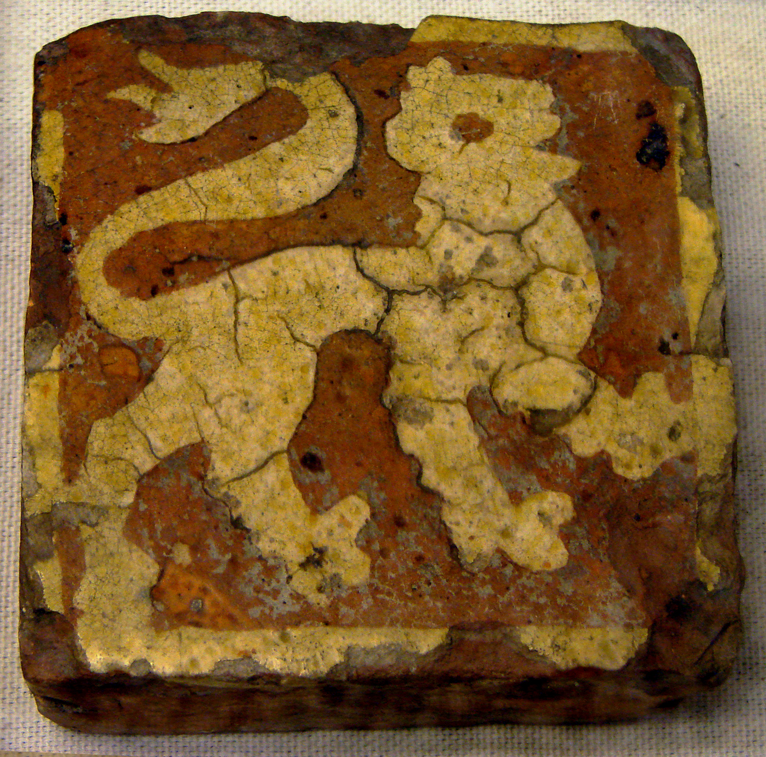 Carreau de pavement, terre glaçurée, époque médiévale (13ème-15ème siècle), provenant de Senlis, Laon ou les environs. Musée de Laon.